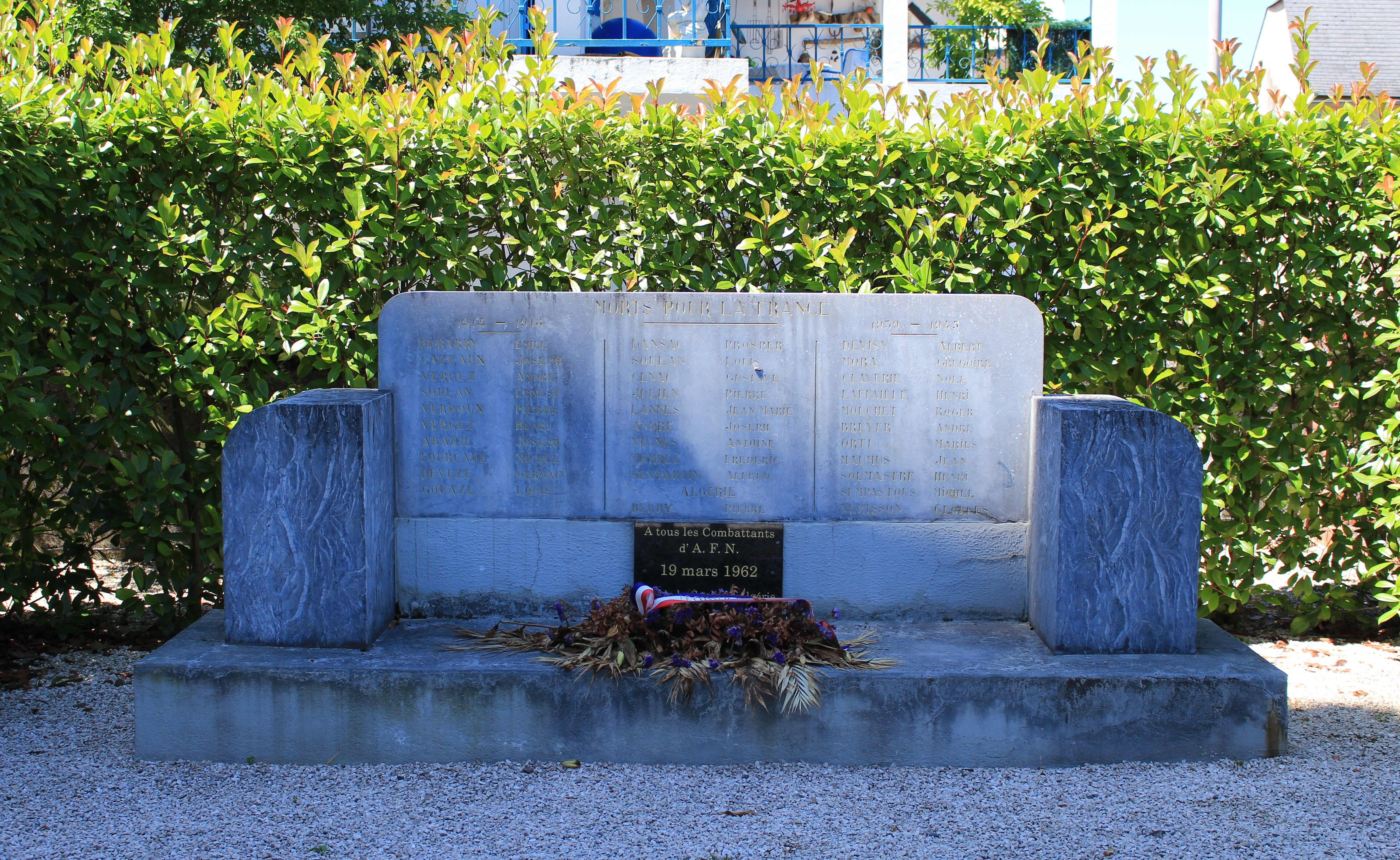 Monument aux morts de Soues (Hautes-Pyrénées)